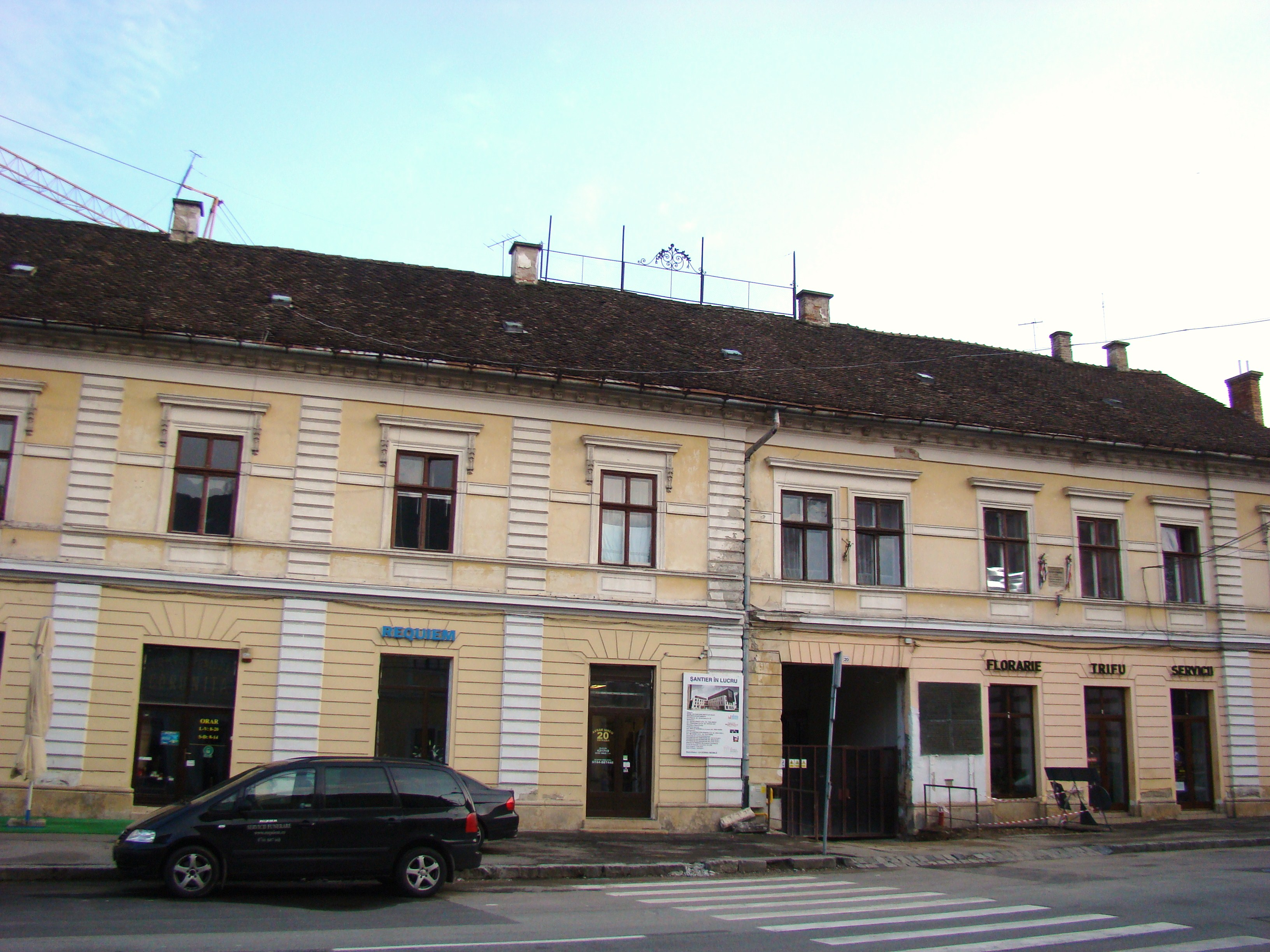 Fostul Hotel Biasini din Cluj